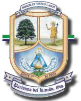 Emblema del Municipio de Purísima del Rincón